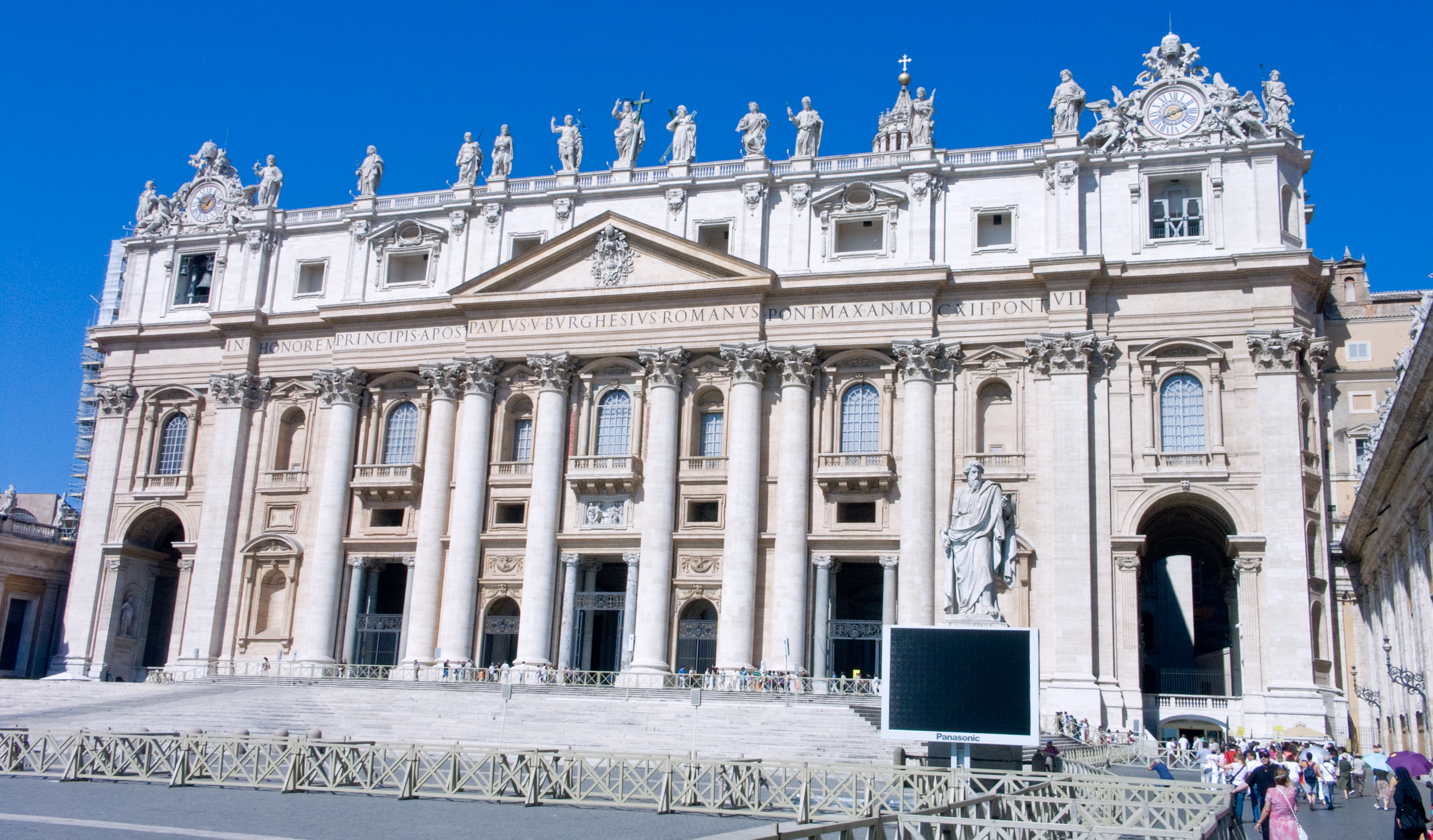 Vatican, Basilique St Pierre, Façade